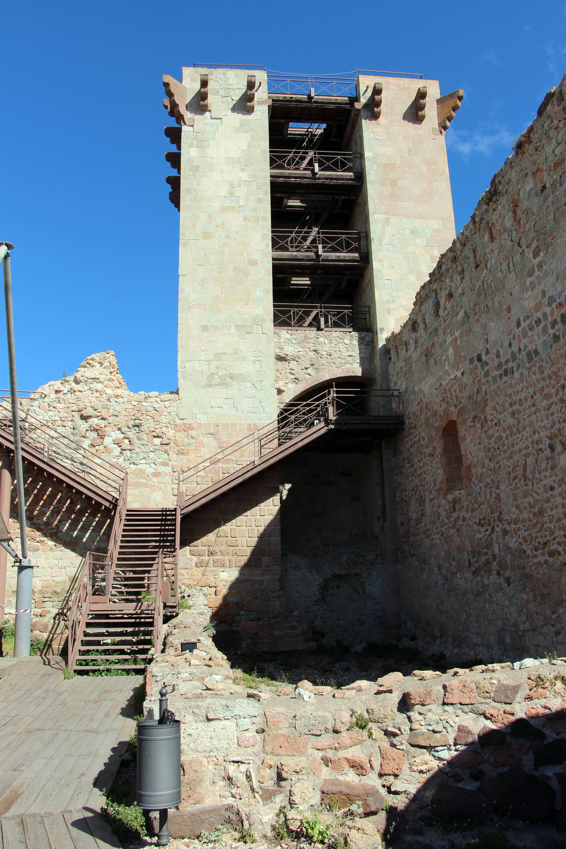 Castello Malaspina The making of this document was supported by Wikimedia CH. (Submit your project!) For all the files concerned, please see the category Supported by Wikimedia CH. This is a photo of a monument which is part of cultural heritage of Italy.